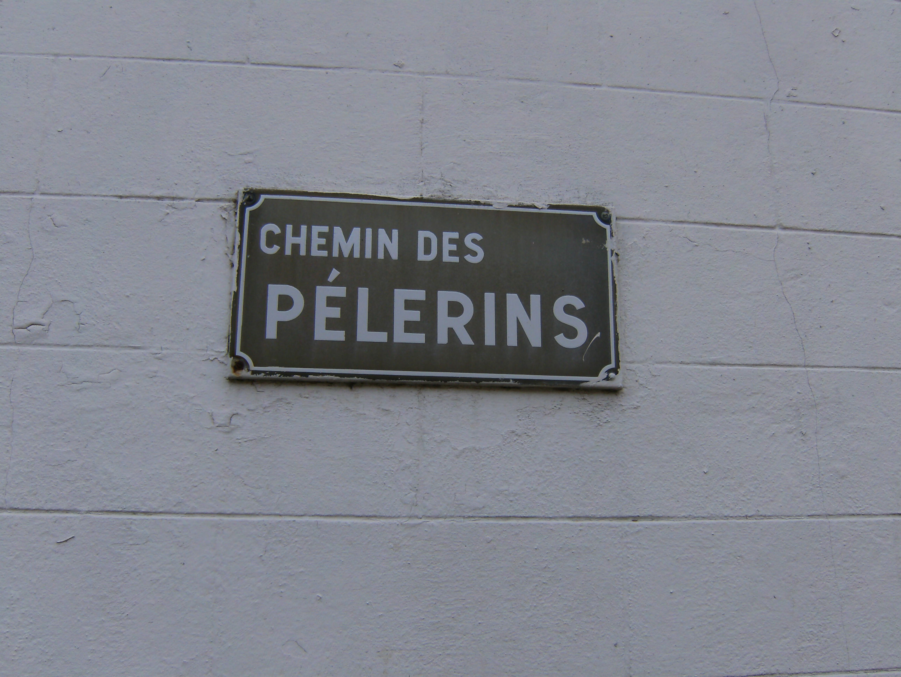 Plaque de rue. Chemin des Pélerins au Mont-Saint-Aubert